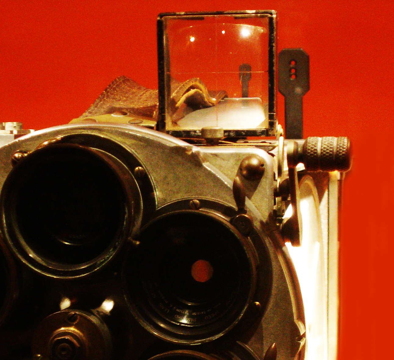 Caméra Camereclair 6 fin années 1020